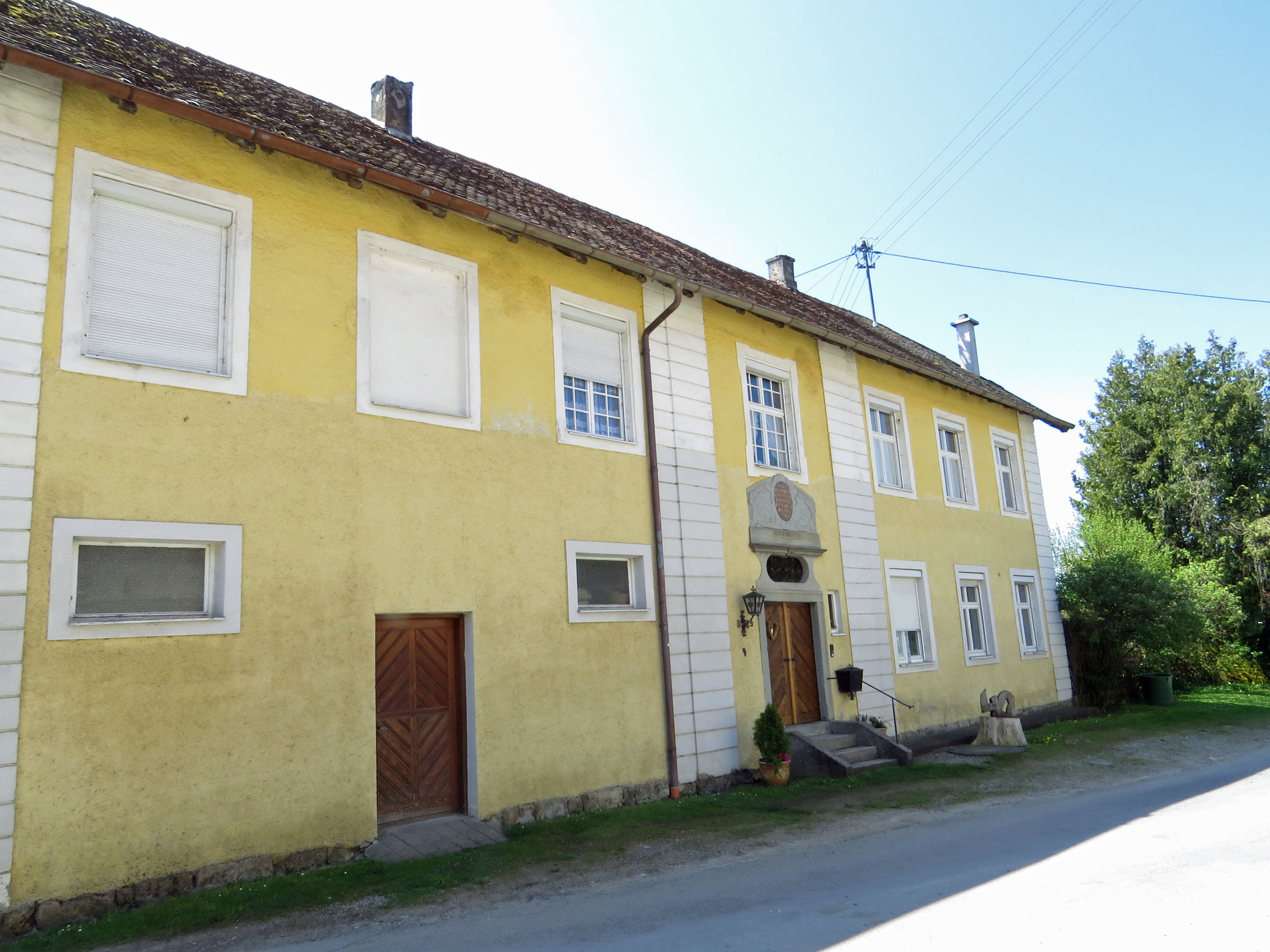 Ehem. Badhaus Dankelsried 4, Erkheim